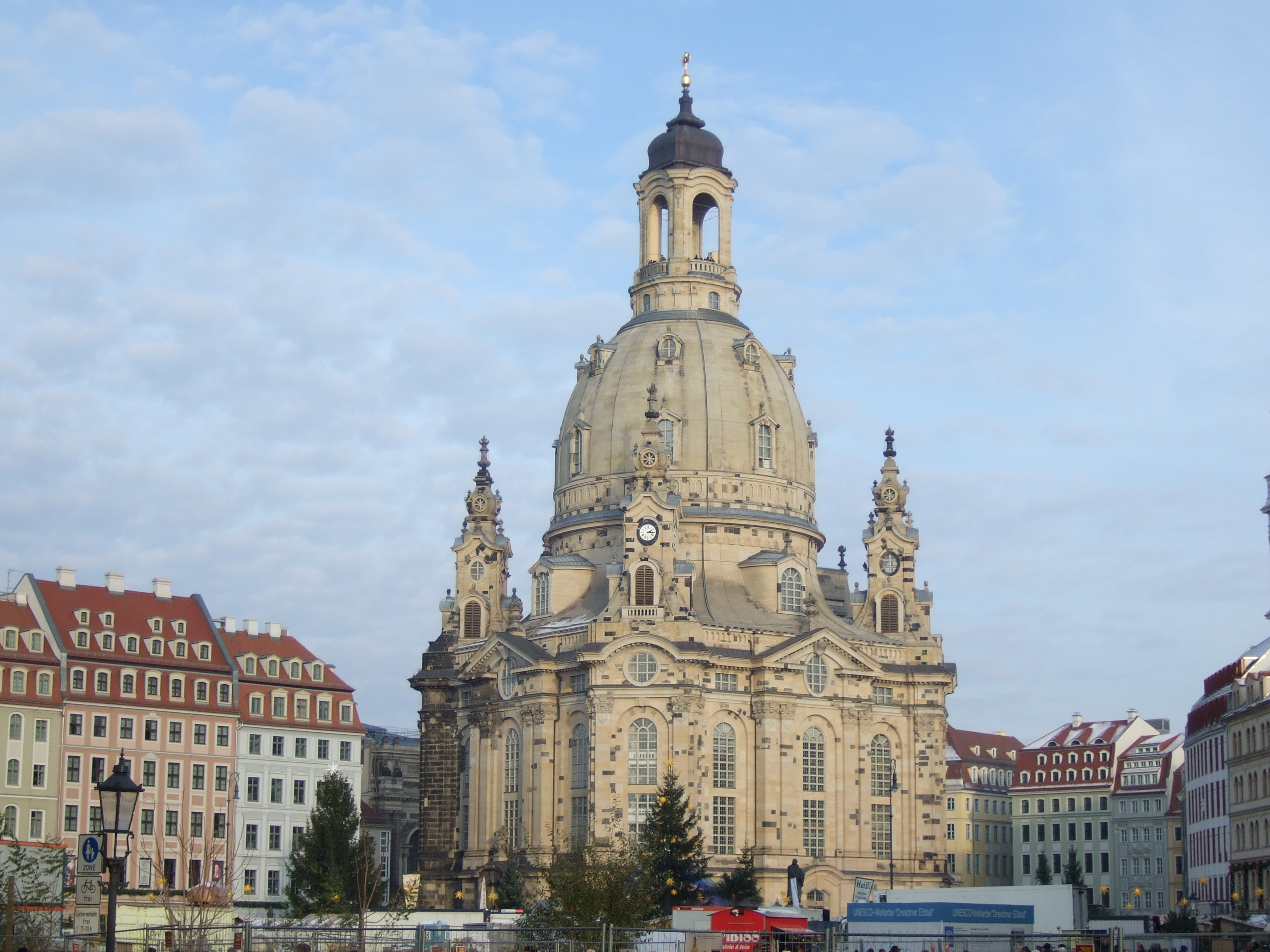 Frauenkirche Dresden